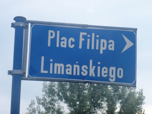 Katowice - plac Filipa Limańskiego